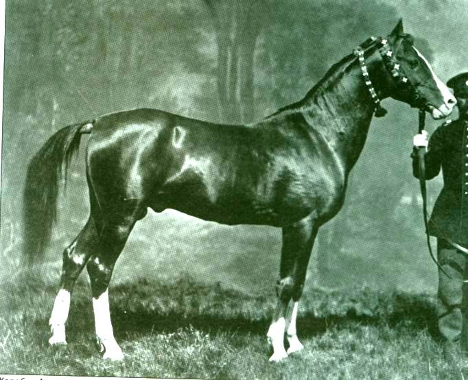 Жеребец Альетмез из завода княгини Уцмиевой, премированный на Всероссийской выставке 1867 г.